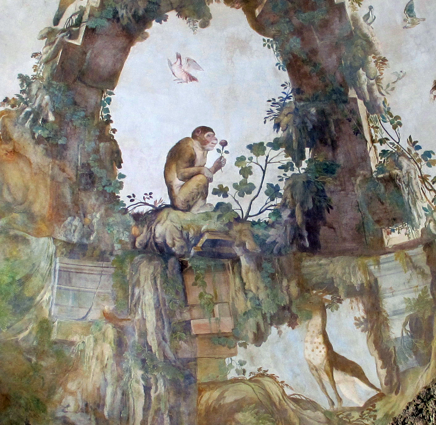 Grotta del Buontalenti, Boboli